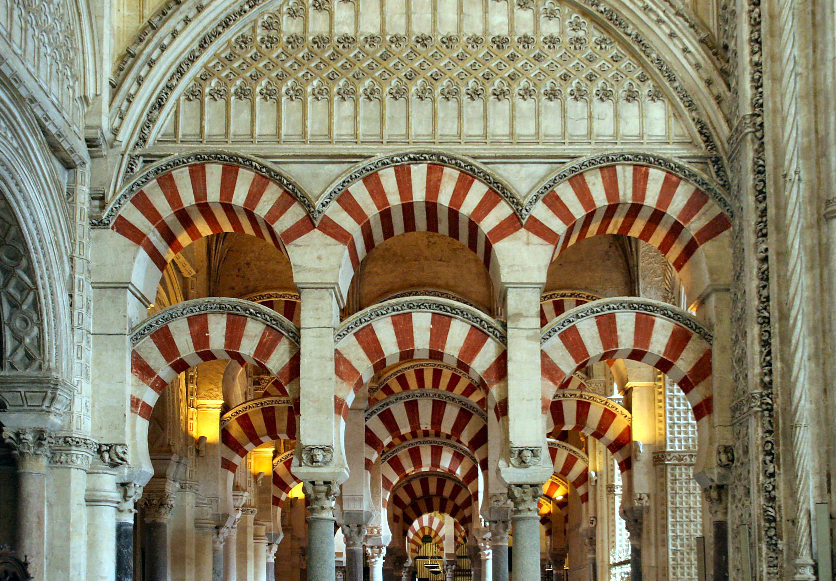 Mezquita de Córdoba, España.